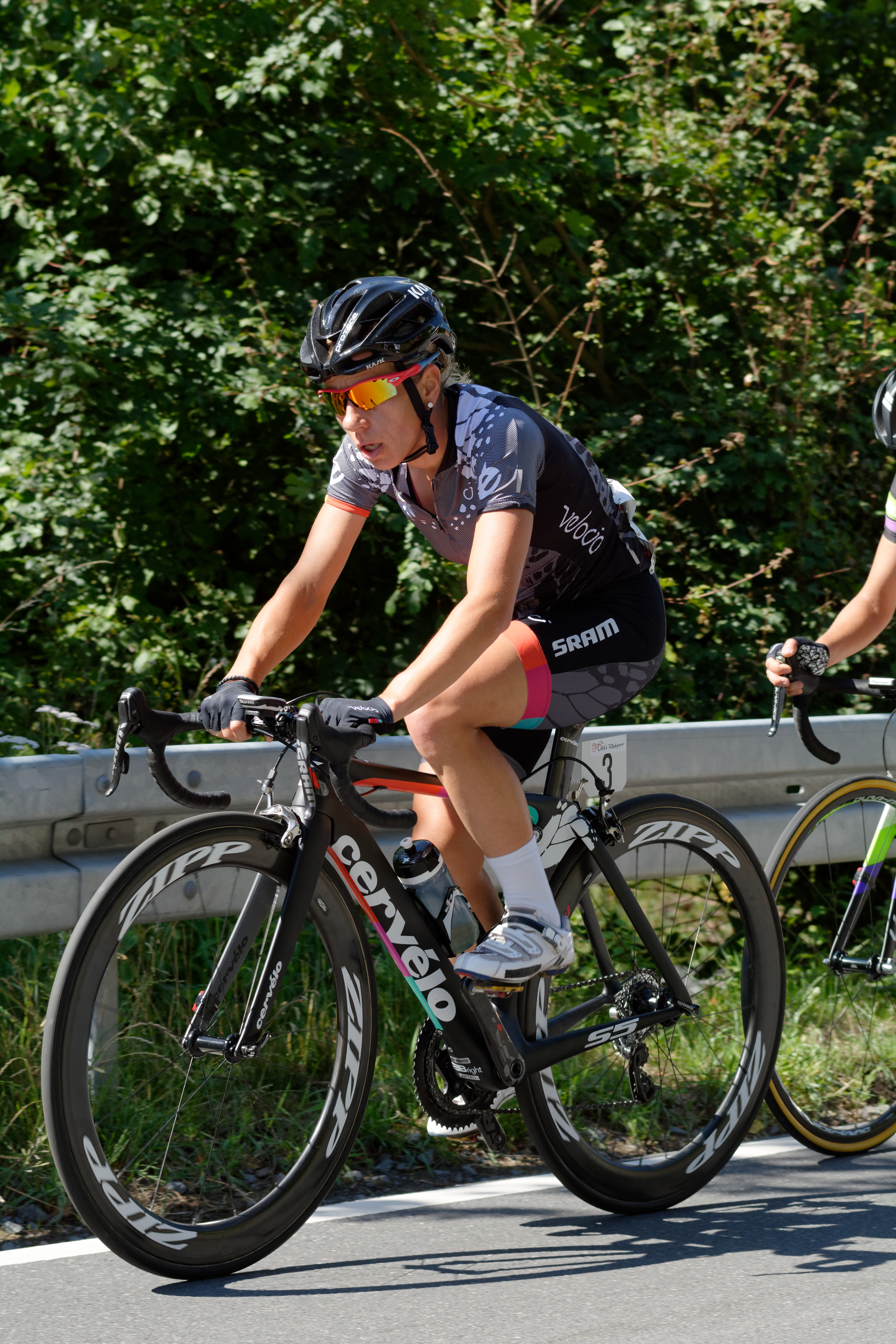 D71_0647_DxO